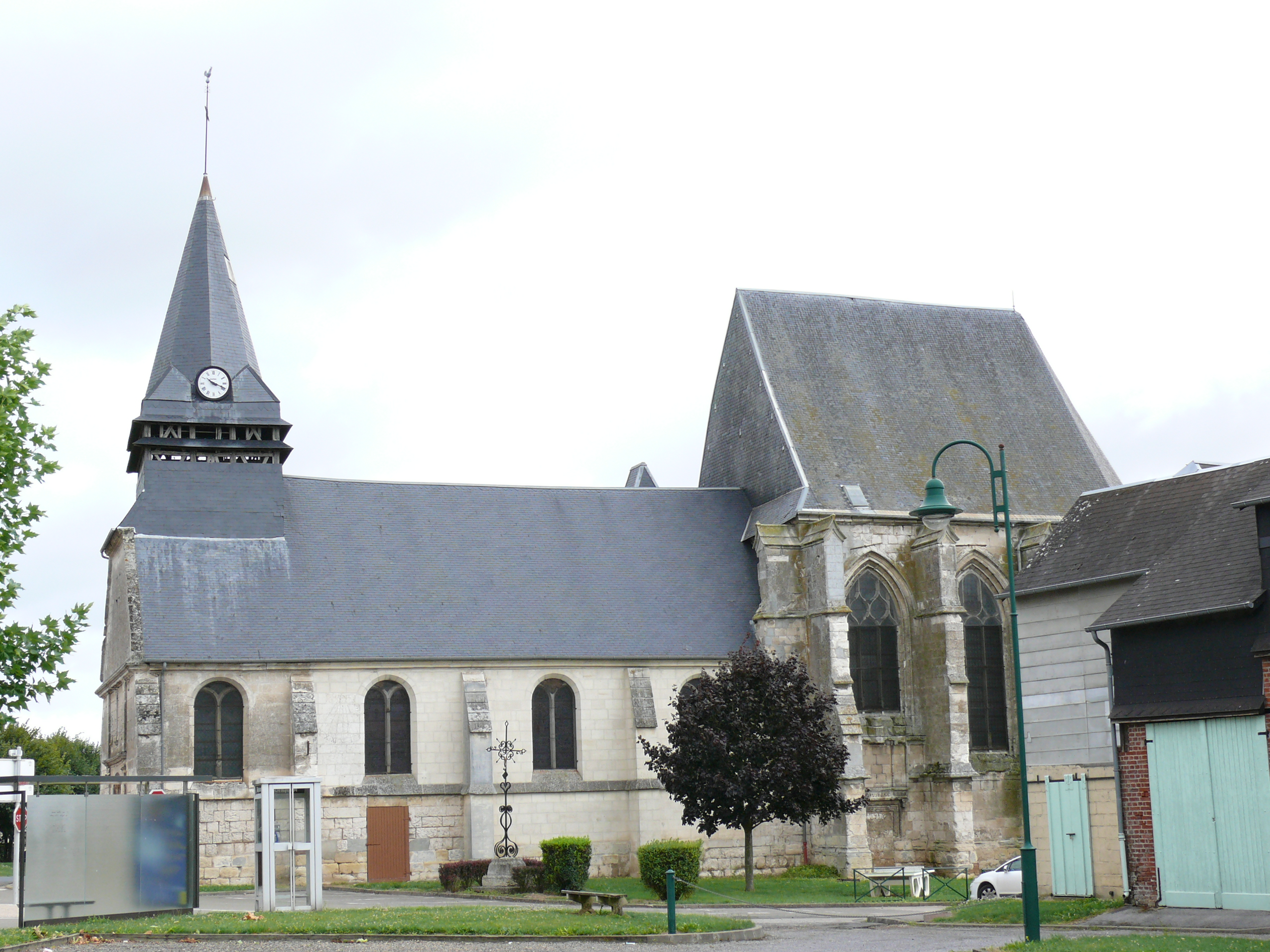 Hardivillers (Oise - Picardie - France) : Église Saint-Pierre et Saint-Paul